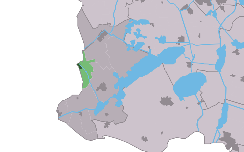 Kaartsje fan himrik fan Hylpen